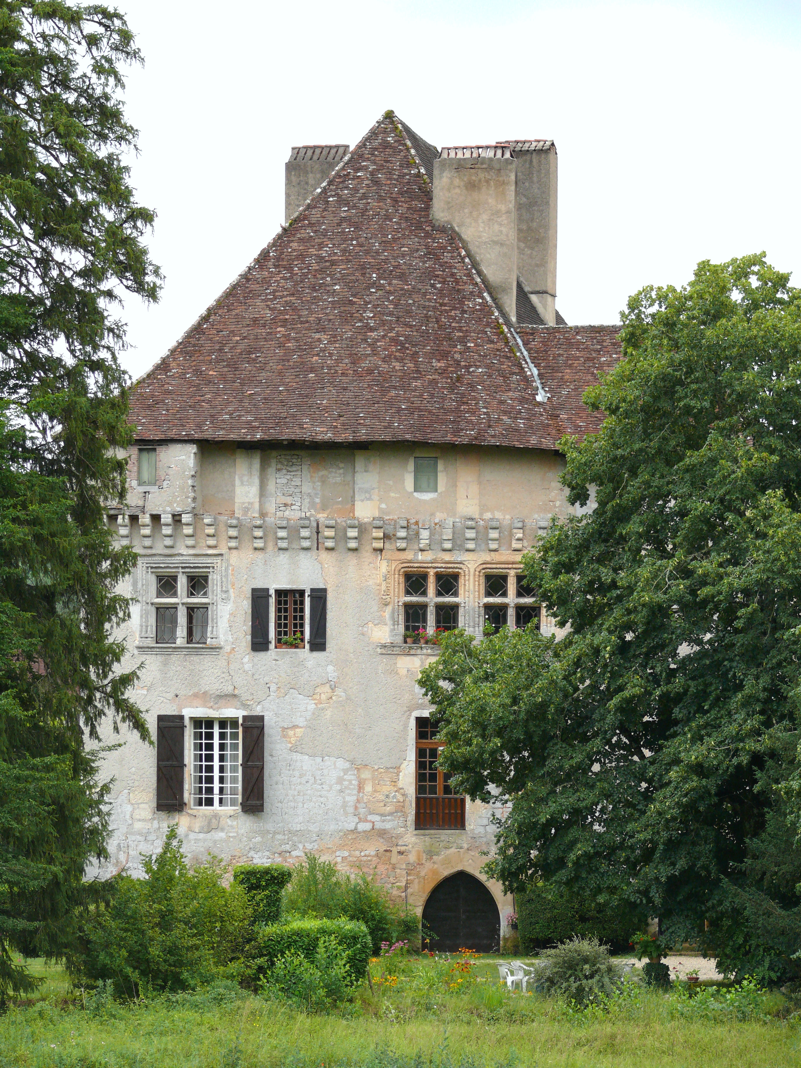 Les Junies - Château